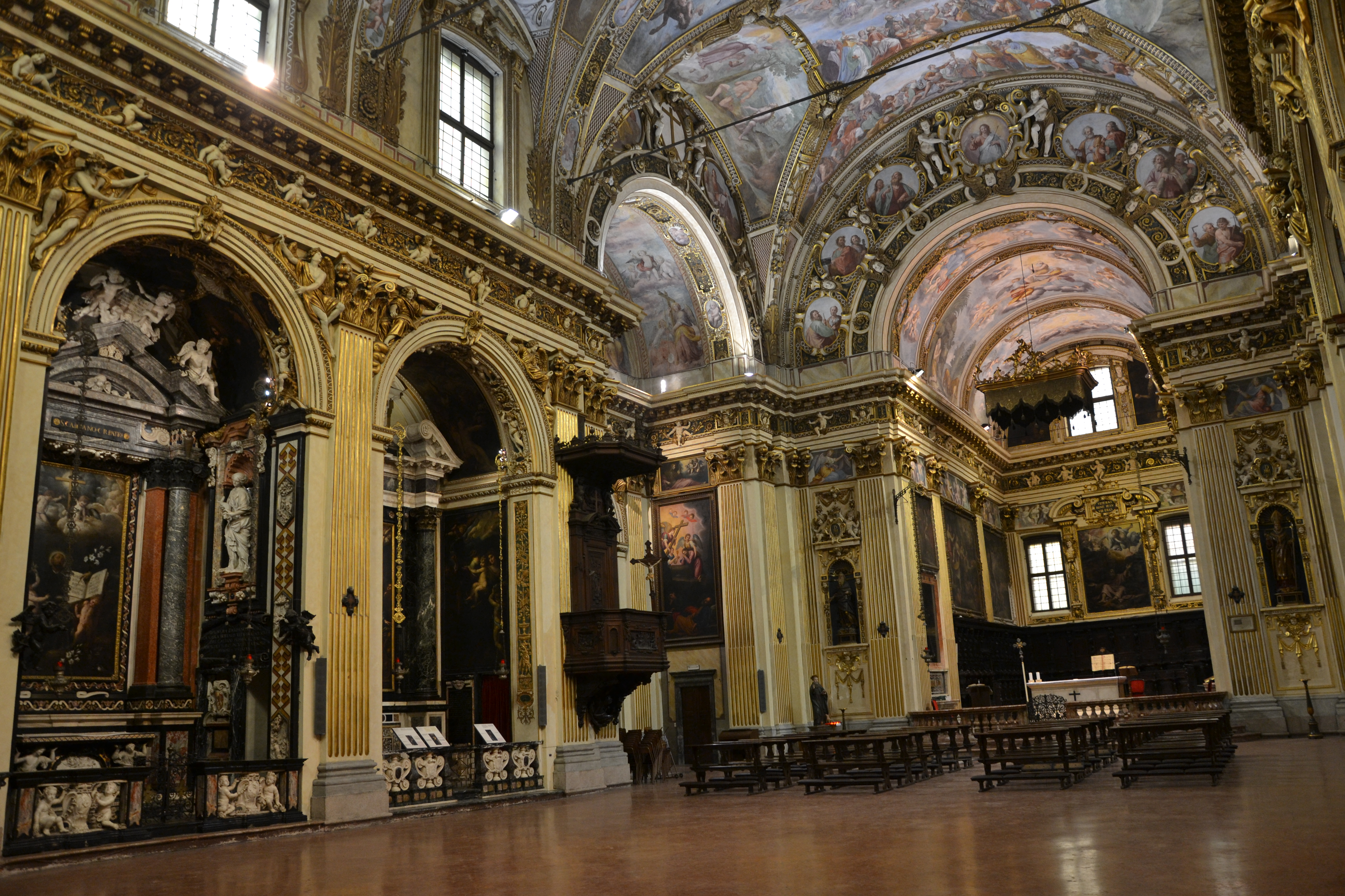 Milano - Sant'Antonio Abate - navata centrale